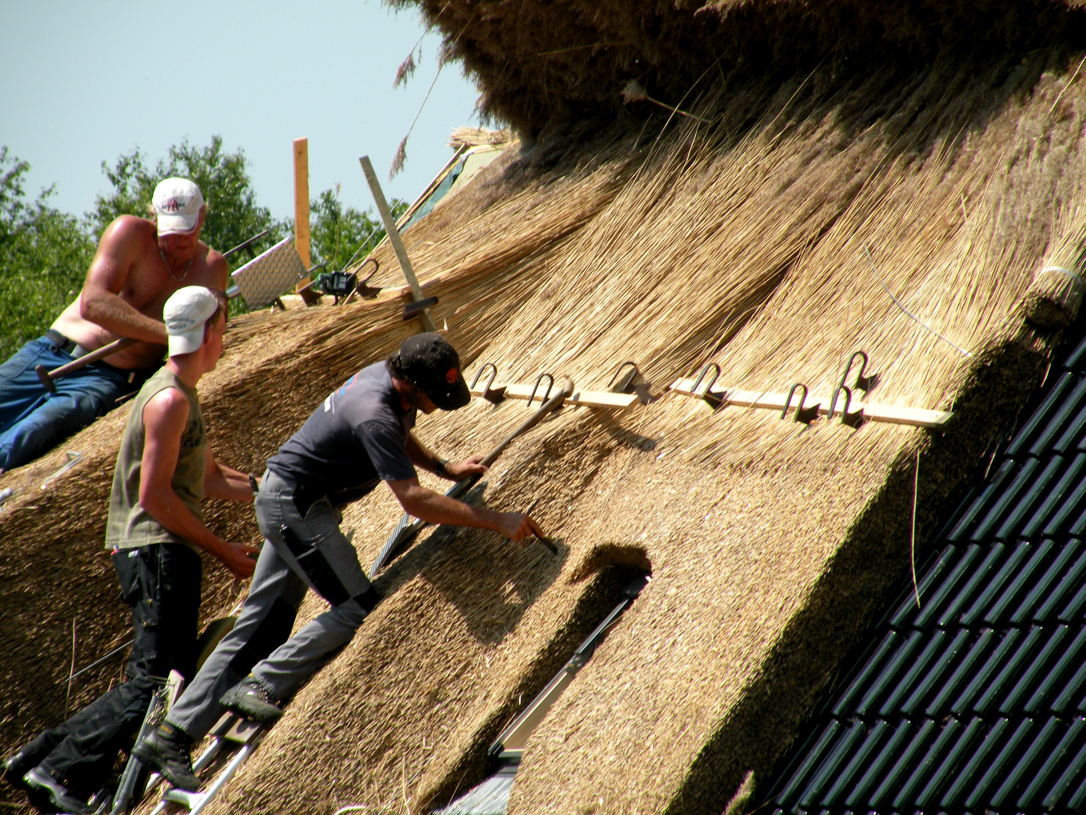 Rietdekkers aan het werk in de Kop van Overijssel, Nederland